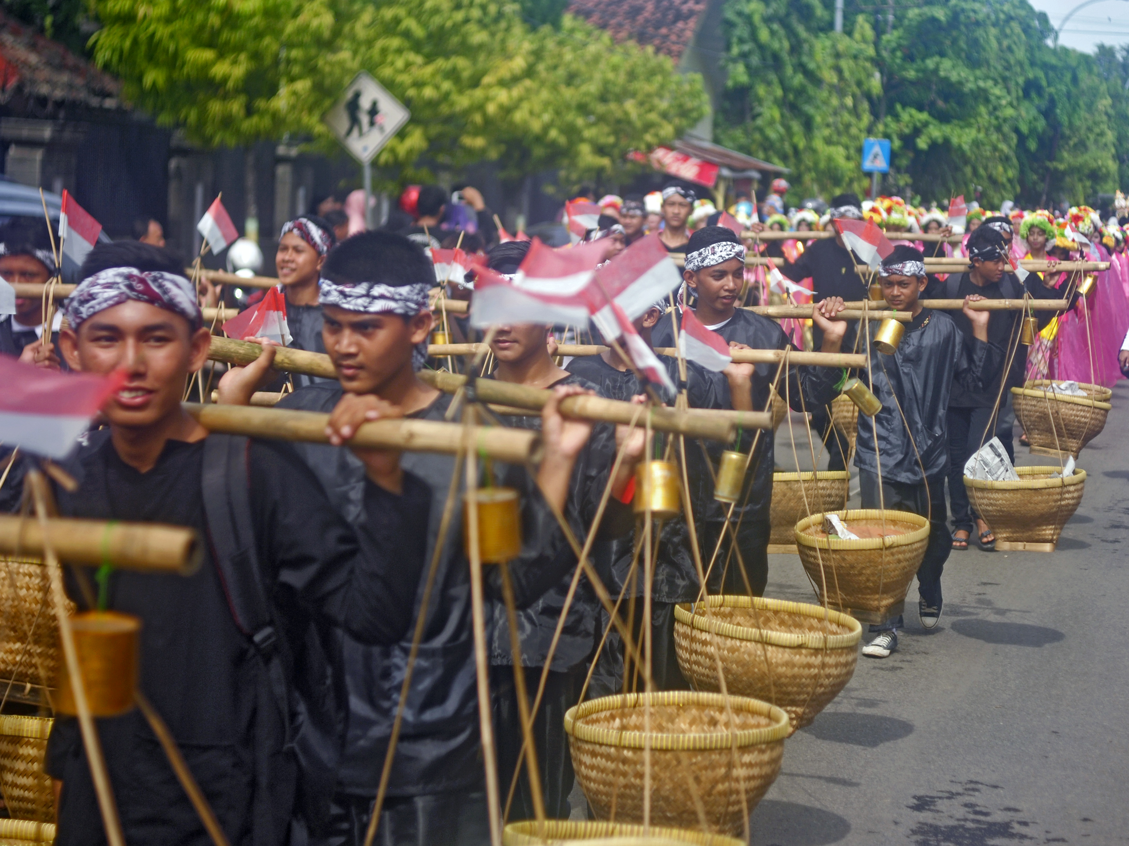 Pesta budaya, mengawali musim tanam, Di Indramayu, yang di isi dengan banyak kesenian maupun lomba, serta Karnaval, dari daerah. dan budaya Gadis Ngarot. berasal desa Lelea. di mana hiasan bunga yang di pakai adalah asli. dan juga memamerkan hasil bumi khas daerah. seperti Mangga. banyak tradisi yang di pamerkan. juga lomba dayung. di Sungai Cimanuk.